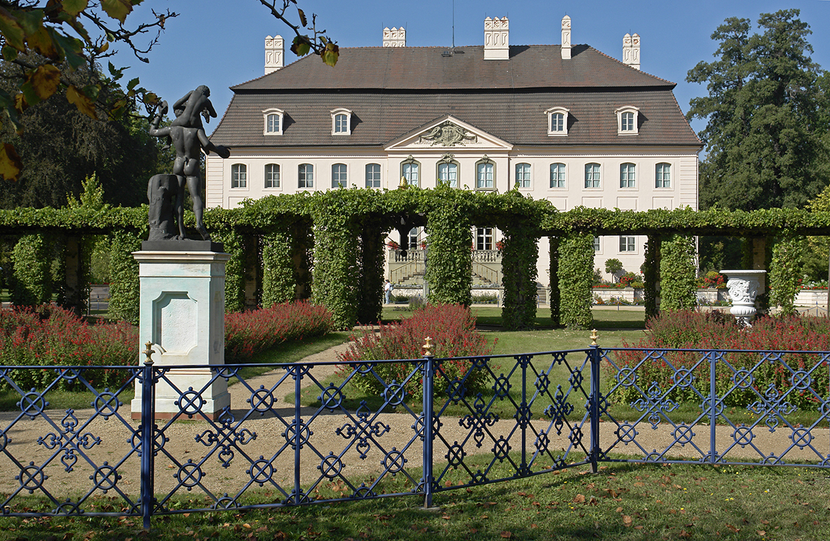 Branitz Park, Schlossansicht